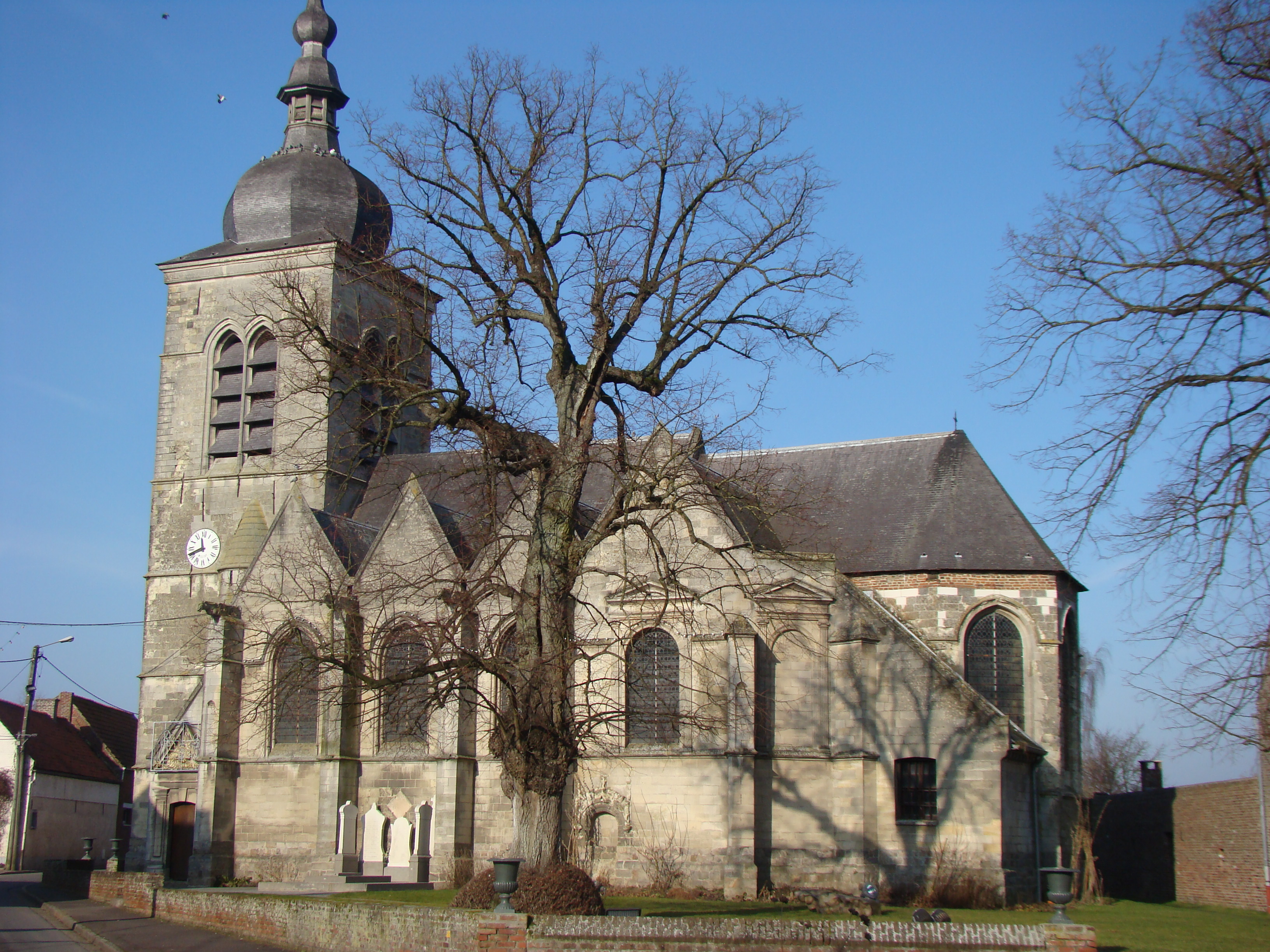 Eglise de Mastaing, monument historique du XVIéme siécle.